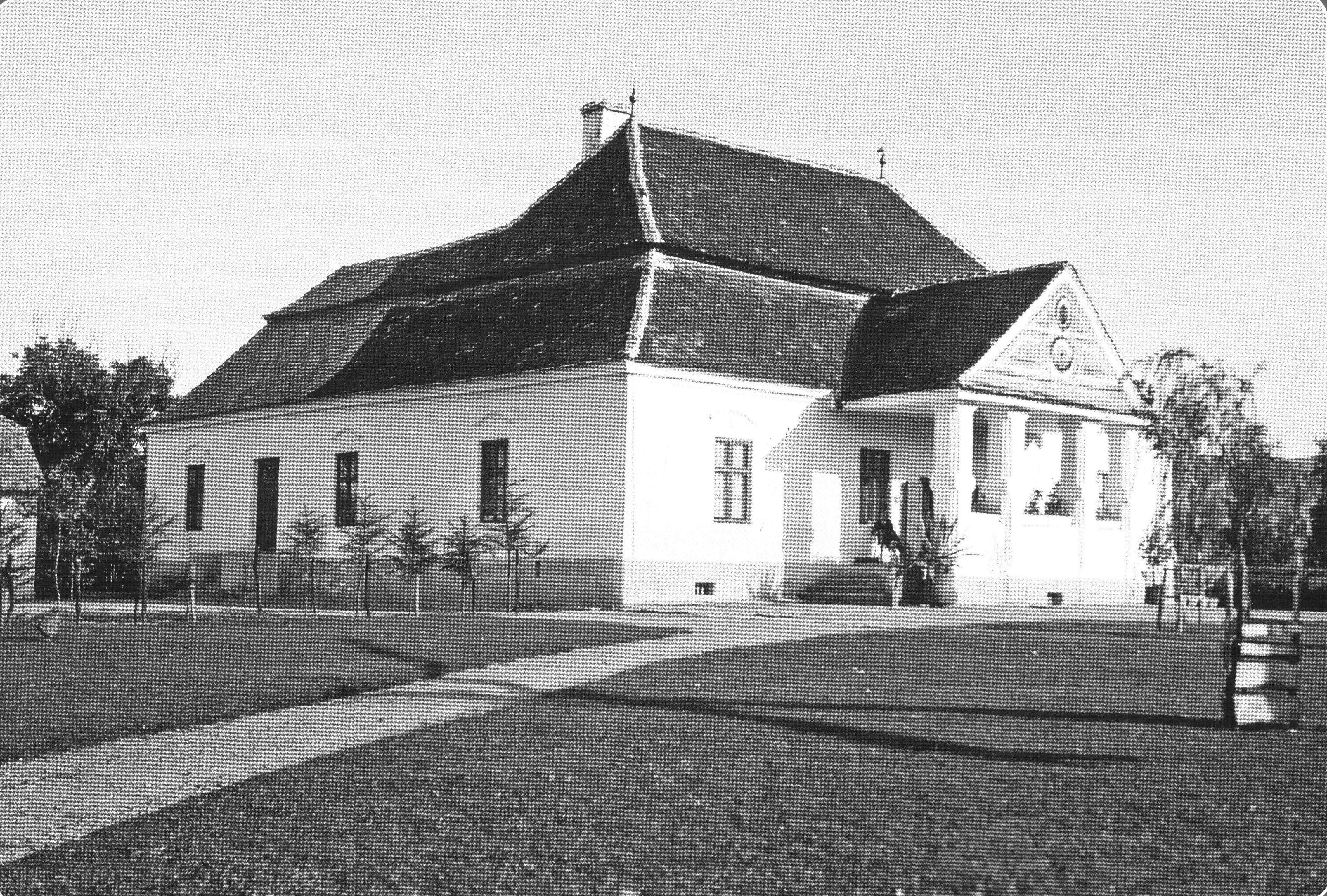 Bíró Udvarház - Betfalva. A Homoródszentmártoni Bíró család háza Betfalván